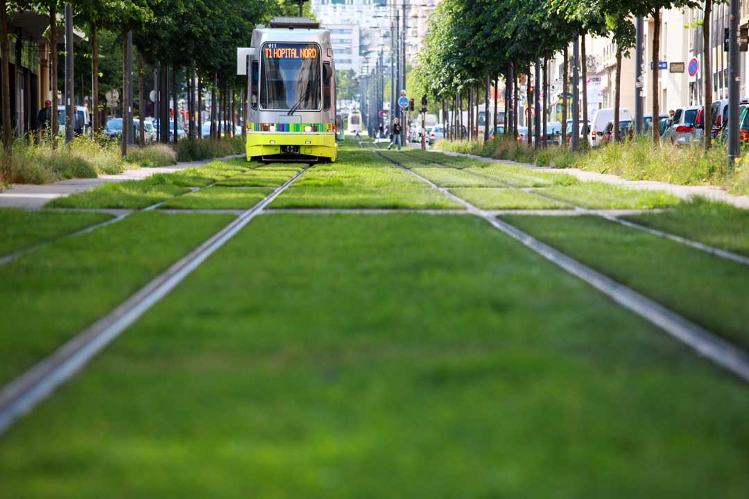 Tramway